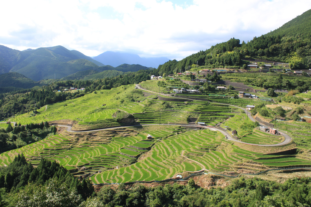 丸山千枚田全景